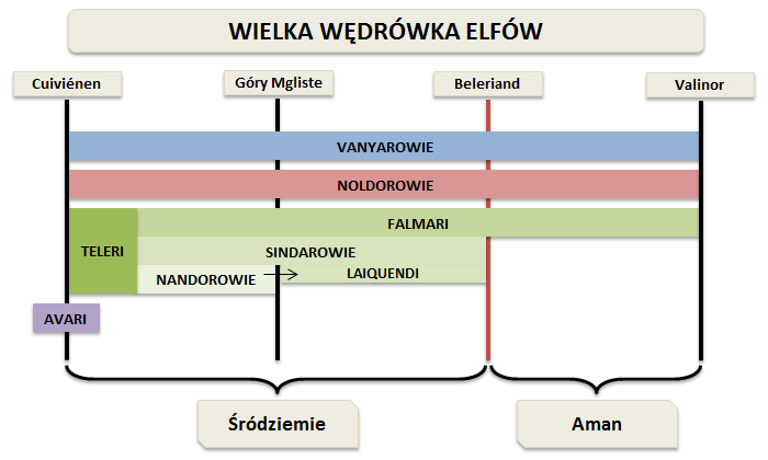 Wielka Wędrówka Elfów